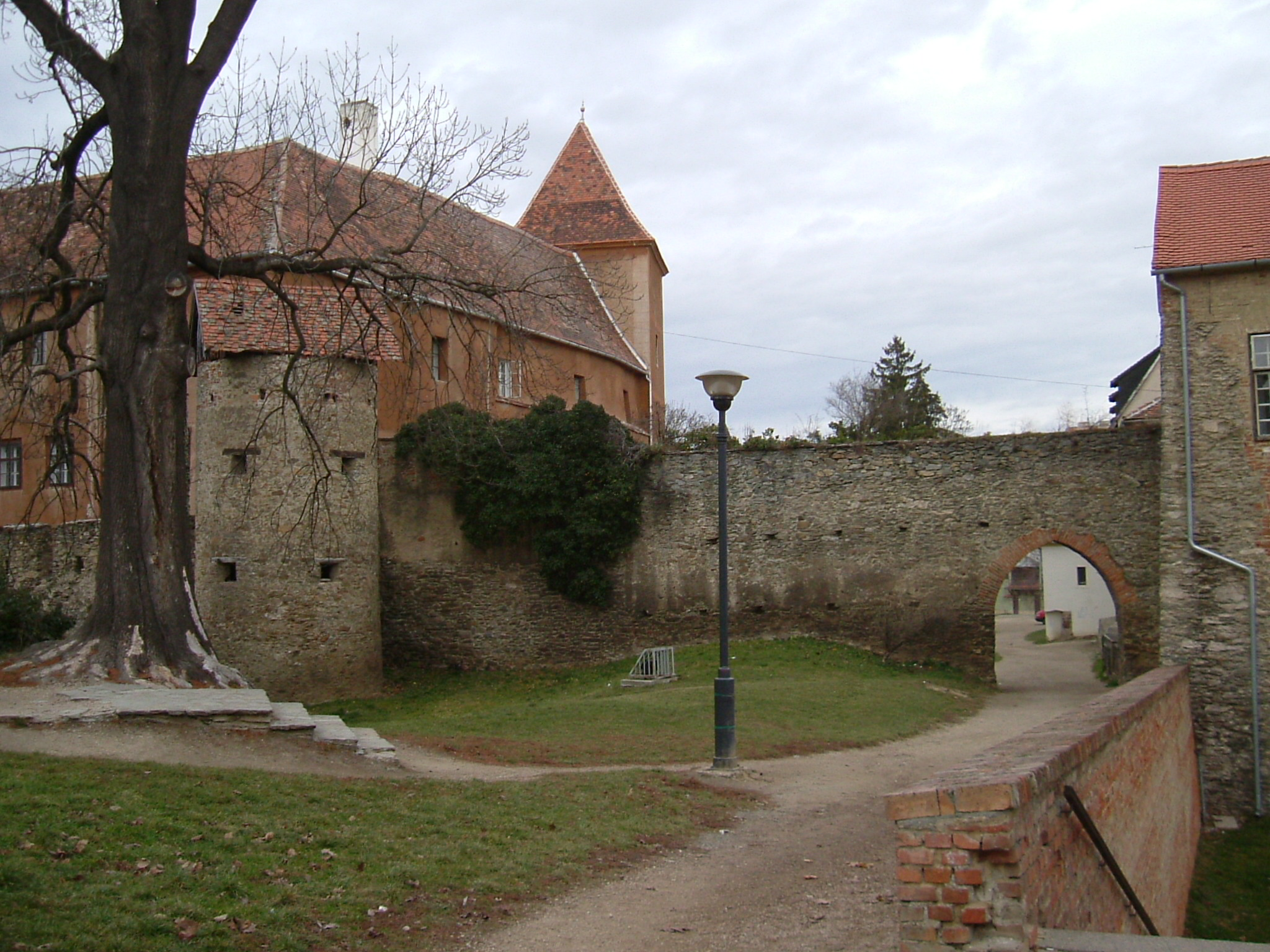 Kőszeg - Hungary, Castle